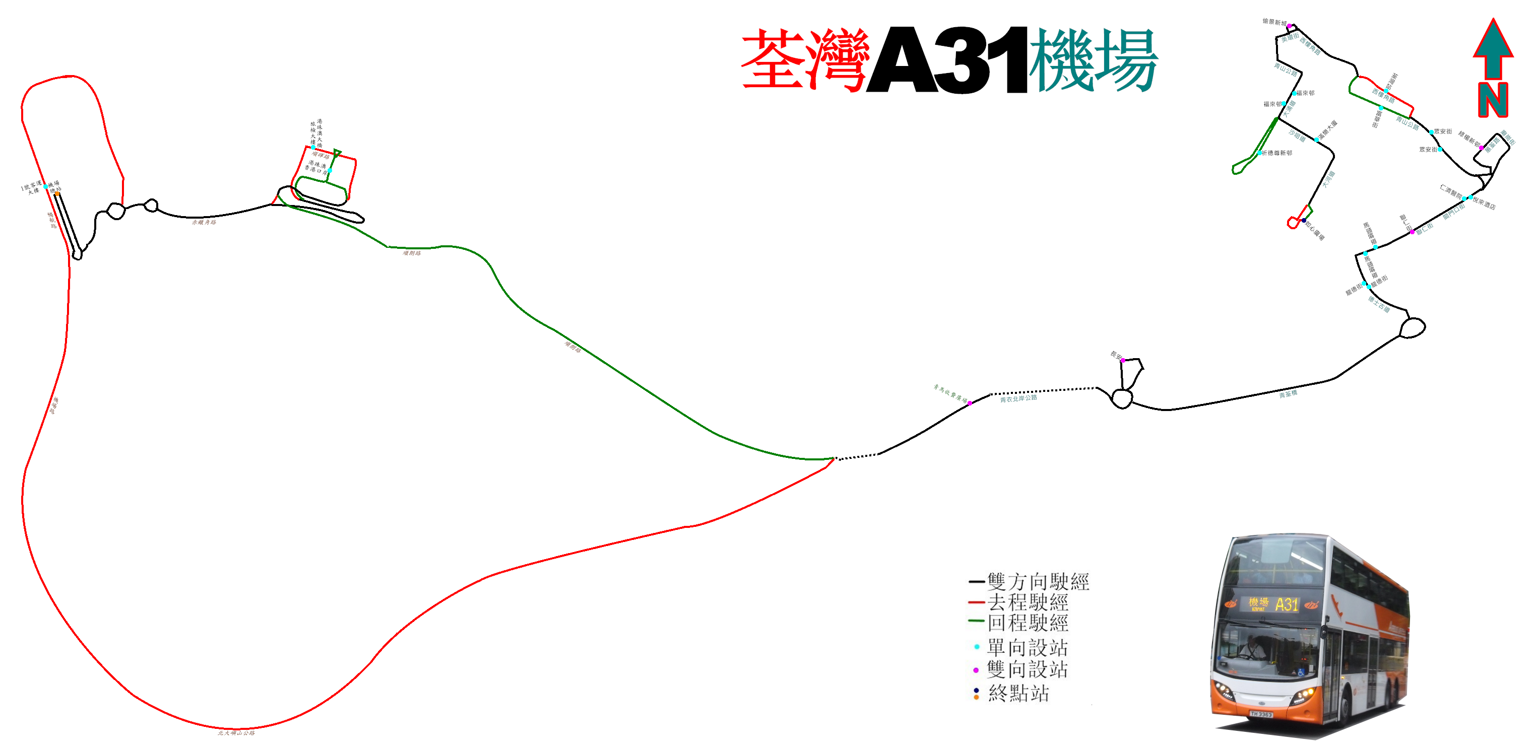 中文（香港）: 龍運巴士A31線的走線圖